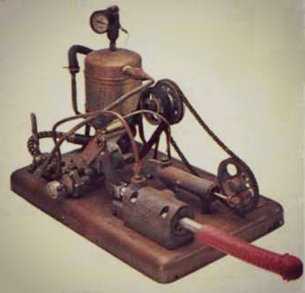 Este es el primer vibrador de la historia inventado por el médico británico Joseph Mortimer Granville en 1870.